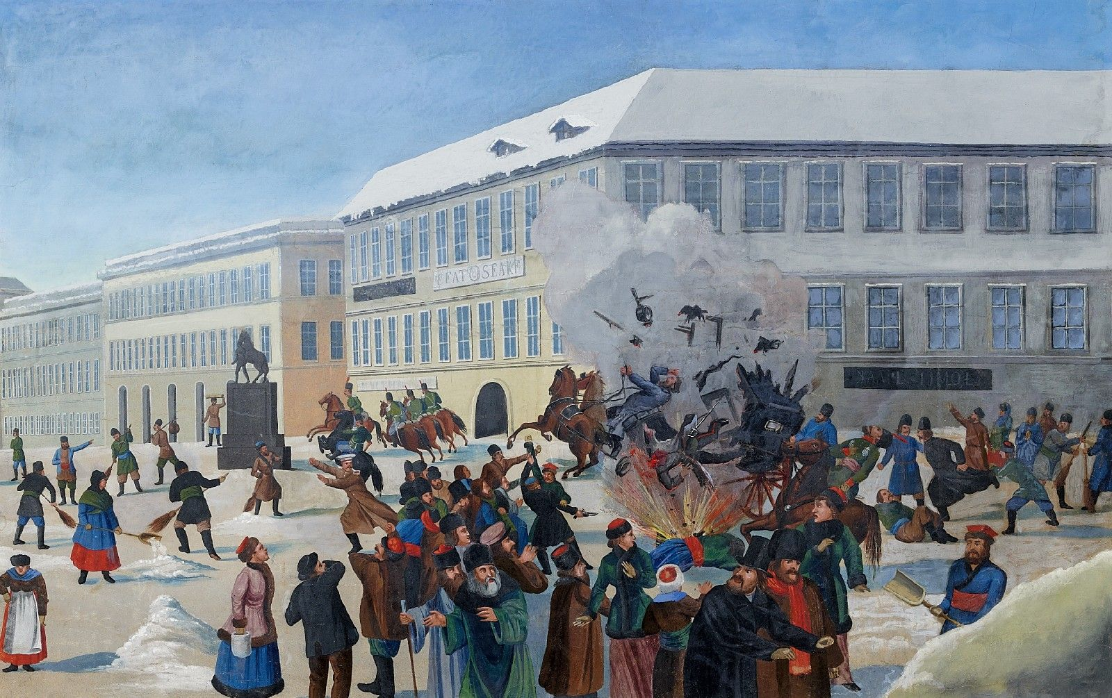 Das Attentat auf Zar Alexander II. am 13. März 1881 in St. Petersburg. Russisch, 19. Jh. Gouache auf Papier. Kaschiert. 57 x 90 cm.